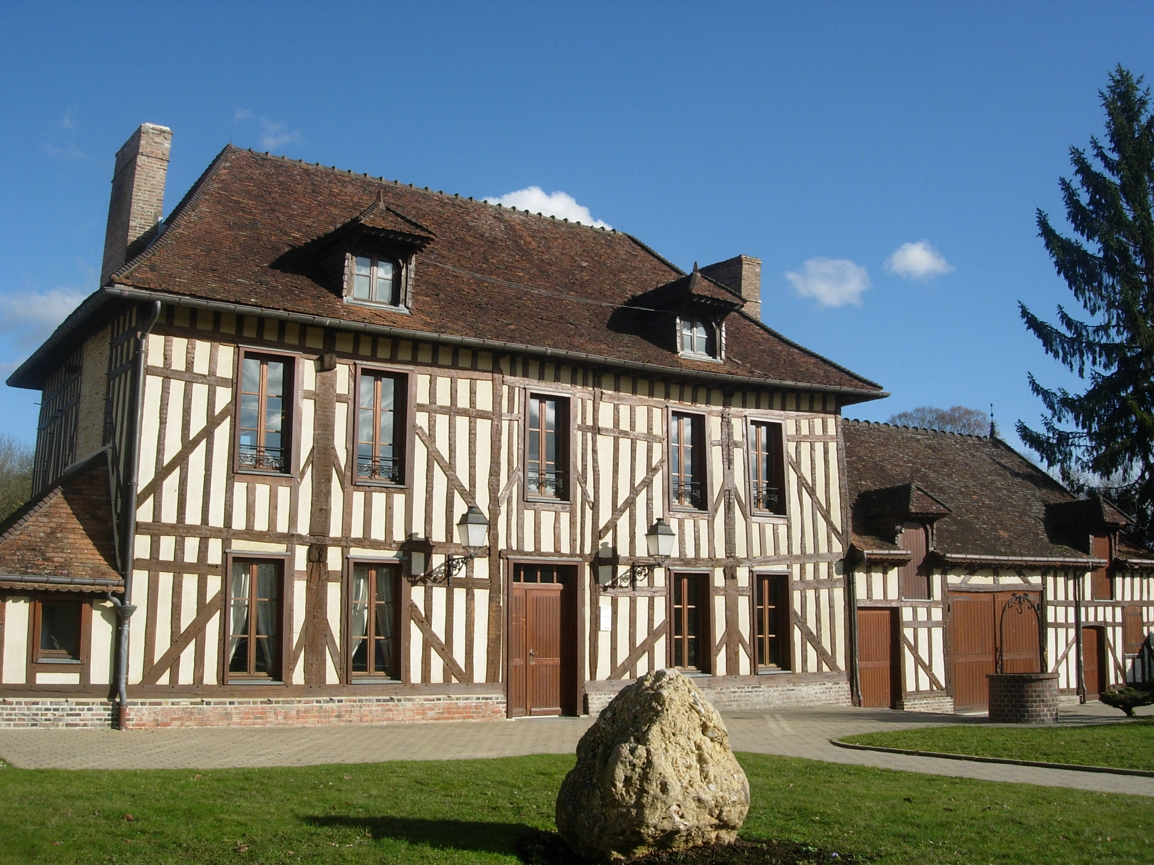 Bibliothèque de Verrières (Aube) - France